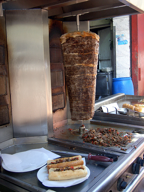 Döner mit Rindfleisch